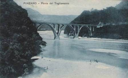 Vecchio ponte sul Tagliamento a Pinzano